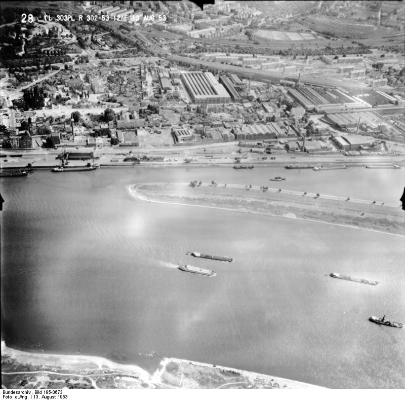 Rheinbefliegung der Alliierten 1953 Information added by Wikimedia users.